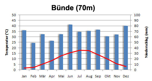 Klimadiagramm fÃ¼r Bünde, eigentlich Herford